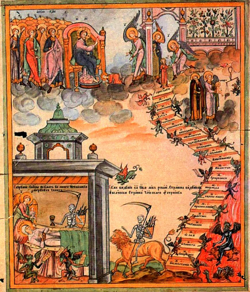 Russian hand-made lubok